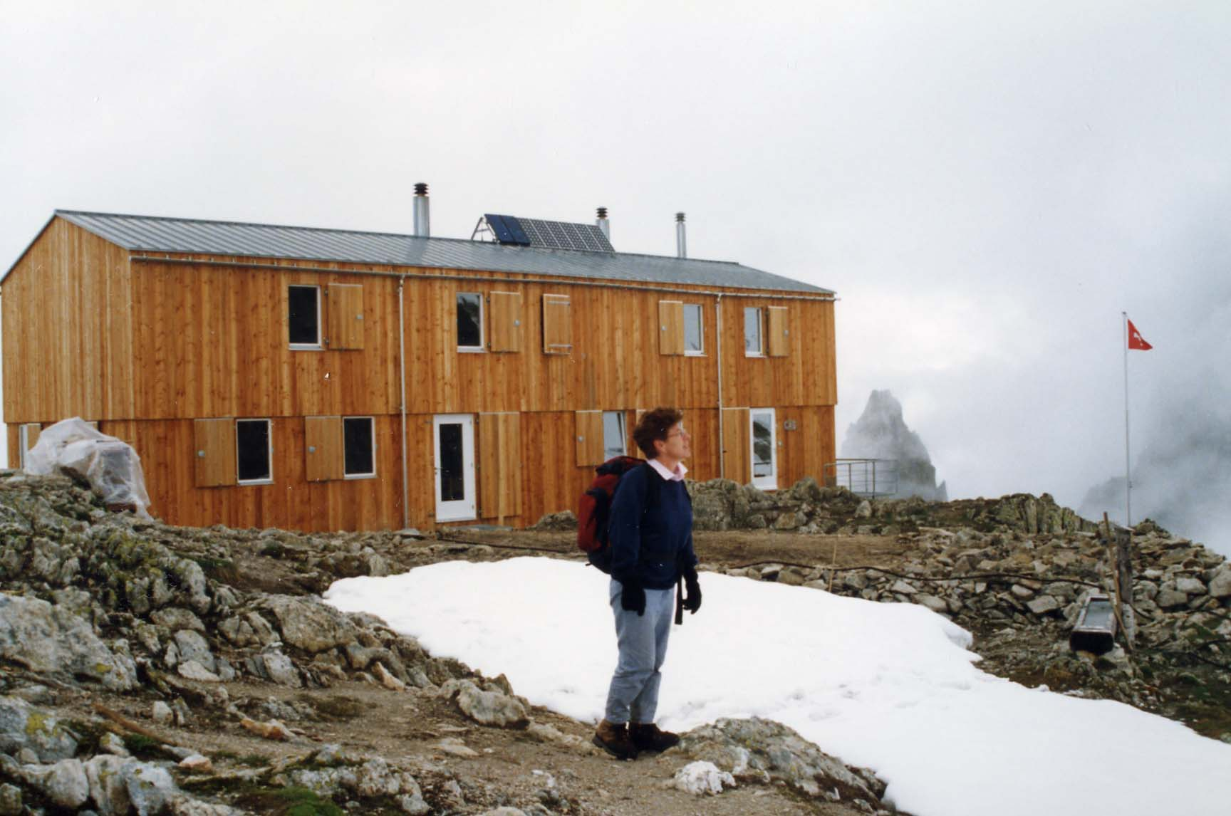 La cabane de Saleinaz ou Saleina